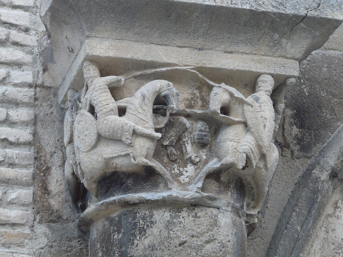 Palacio de los Reyes de Navarra, , Estella, Navarre, Spain